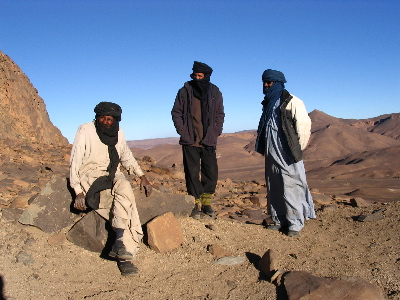 Touareg Algérie